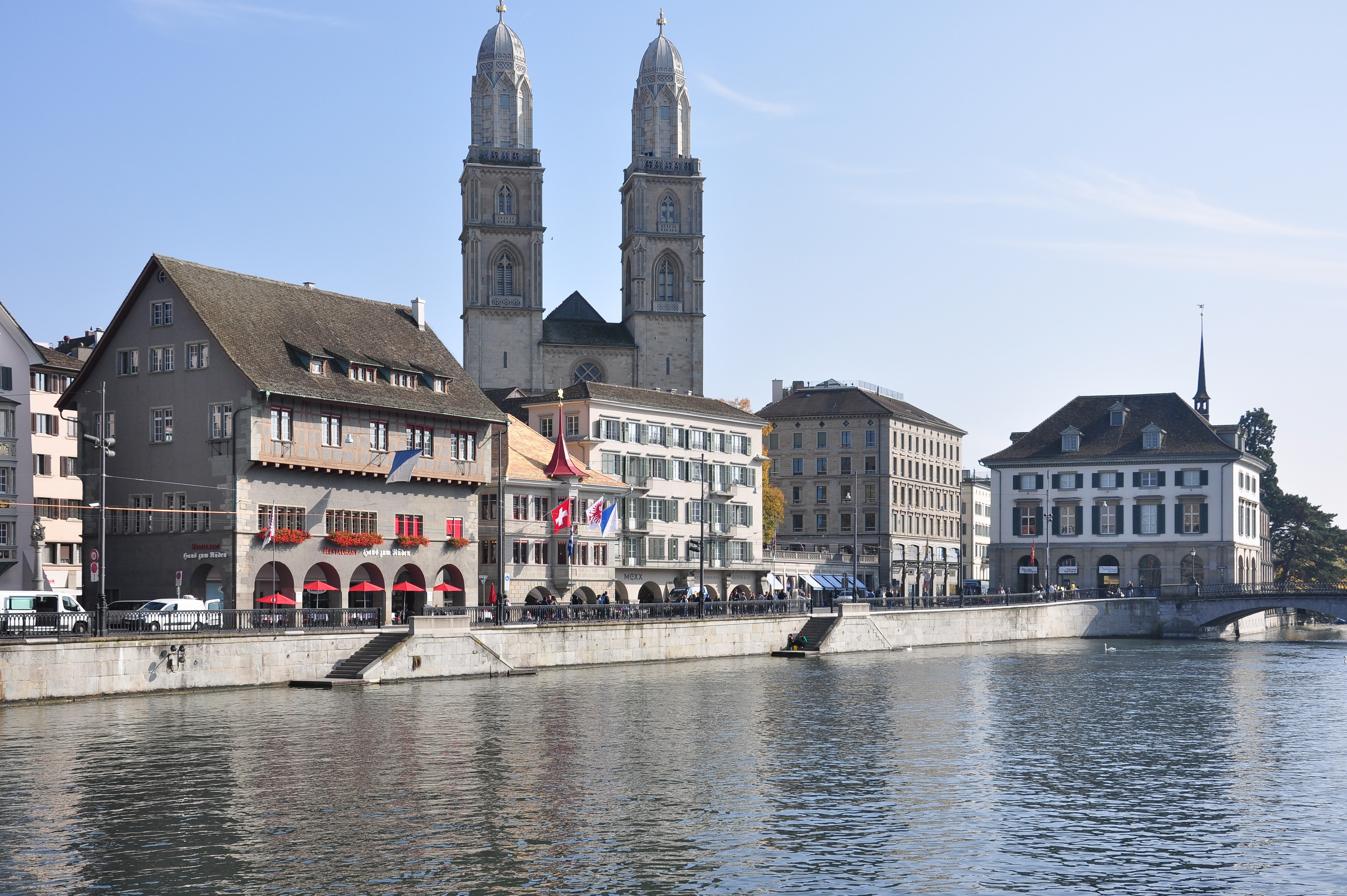 Haus zum Rüden, Zunfthaus zur Zimmerleuten – rebuilt and newly inaugurated in October 2010 – at Limmatquai in Zürich (Switzerland), as seen from Wühre, Helmhaus (Wasserkirche to the right, Grossmünster in the backbground.